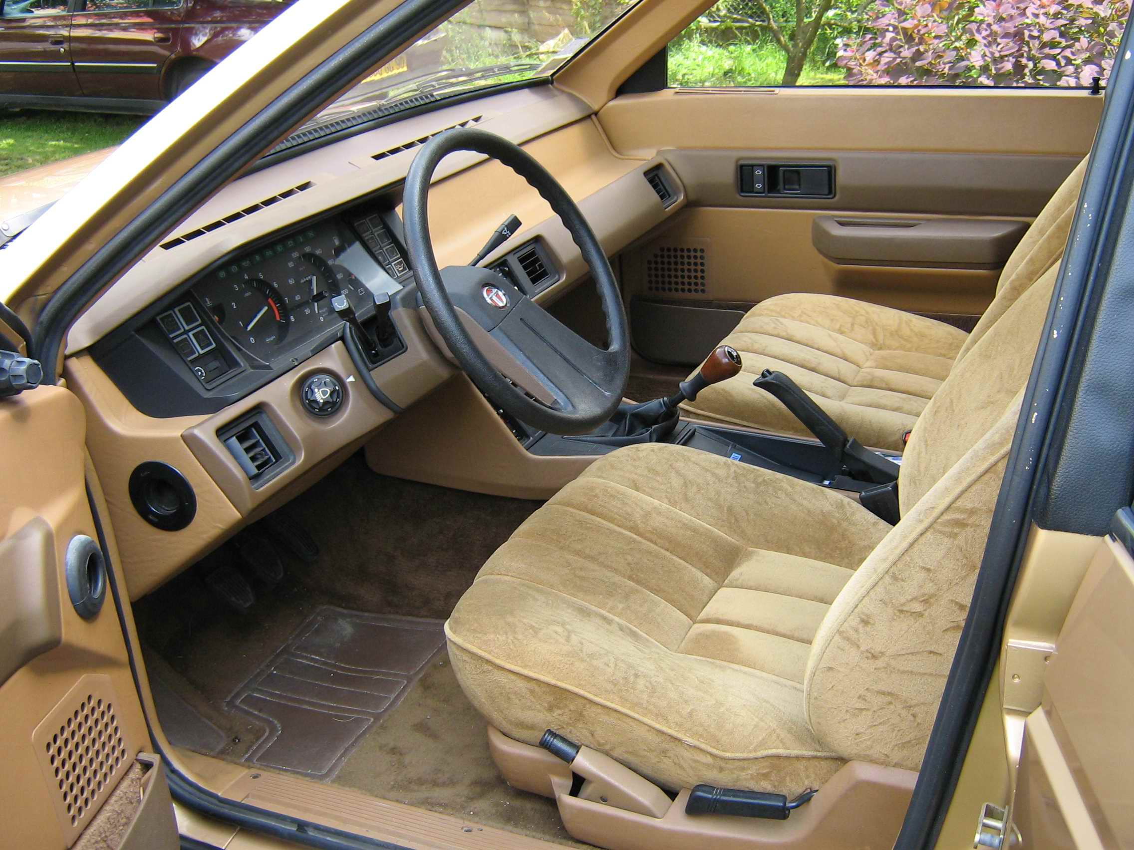 1982 Talbot Tagora SX, 2.6 litre V6.